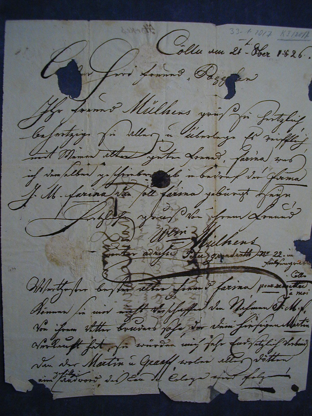 Brief von Wilhelm Mülhens an Herrn Pappler in Düsseldorf. Mülhens bitte Pappler Ihm bei seiner Firmeangelegenheit zu helfen.